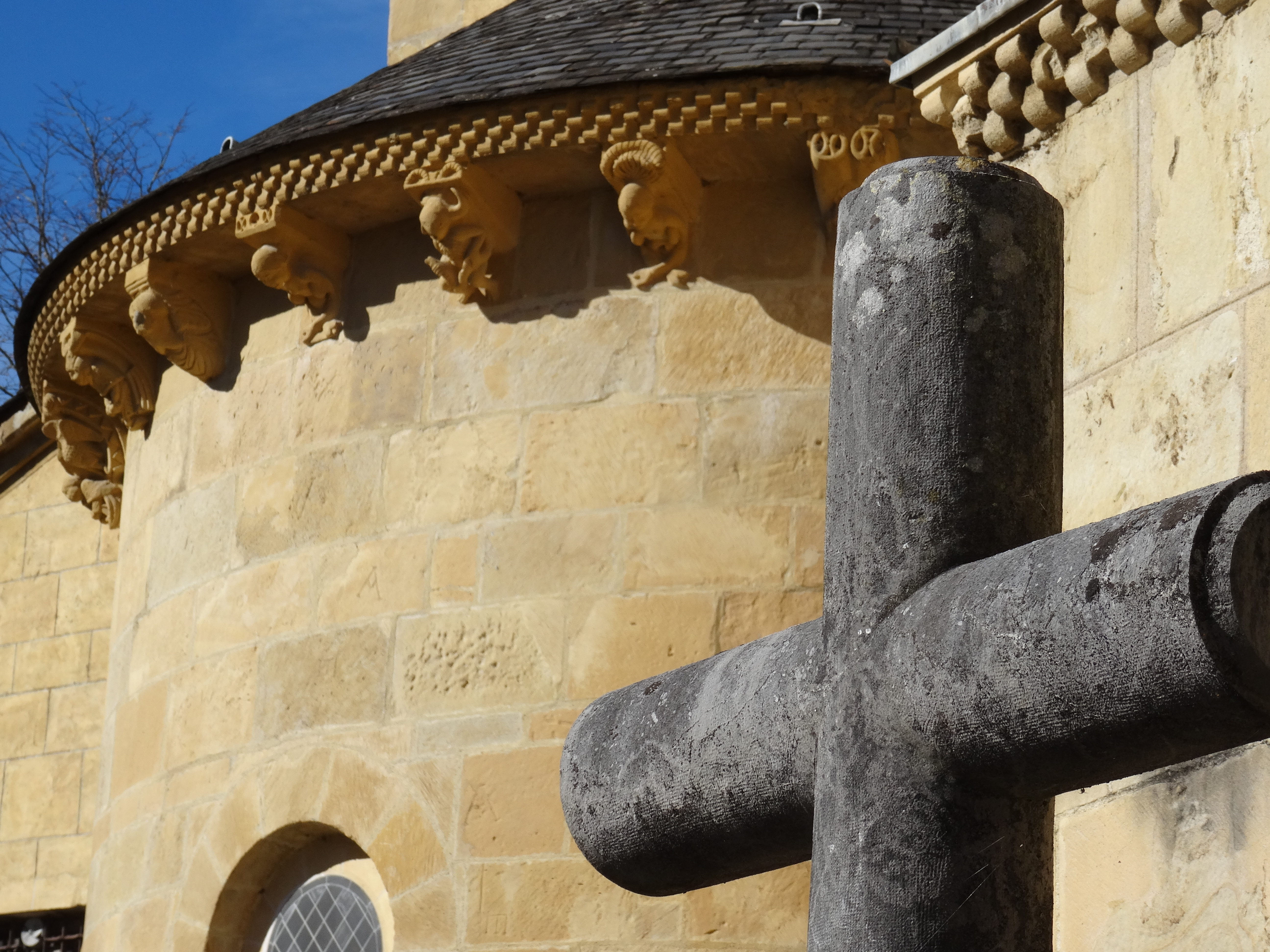 Extérieur de la cathédrale de Lescar